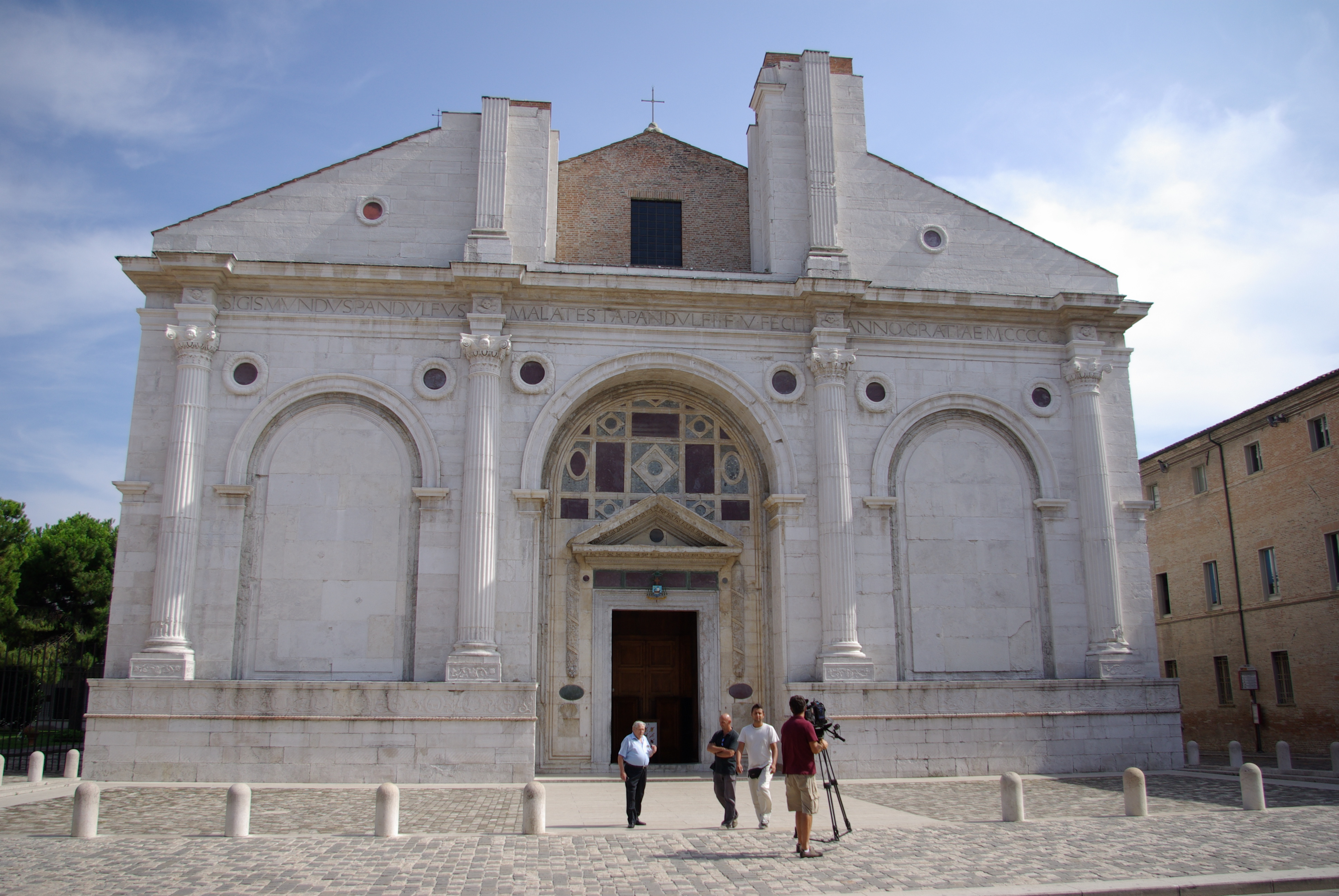 Tempio Malatestiano - MIBAC This is a photo of a monument which is part of cultural heritage of Italy.